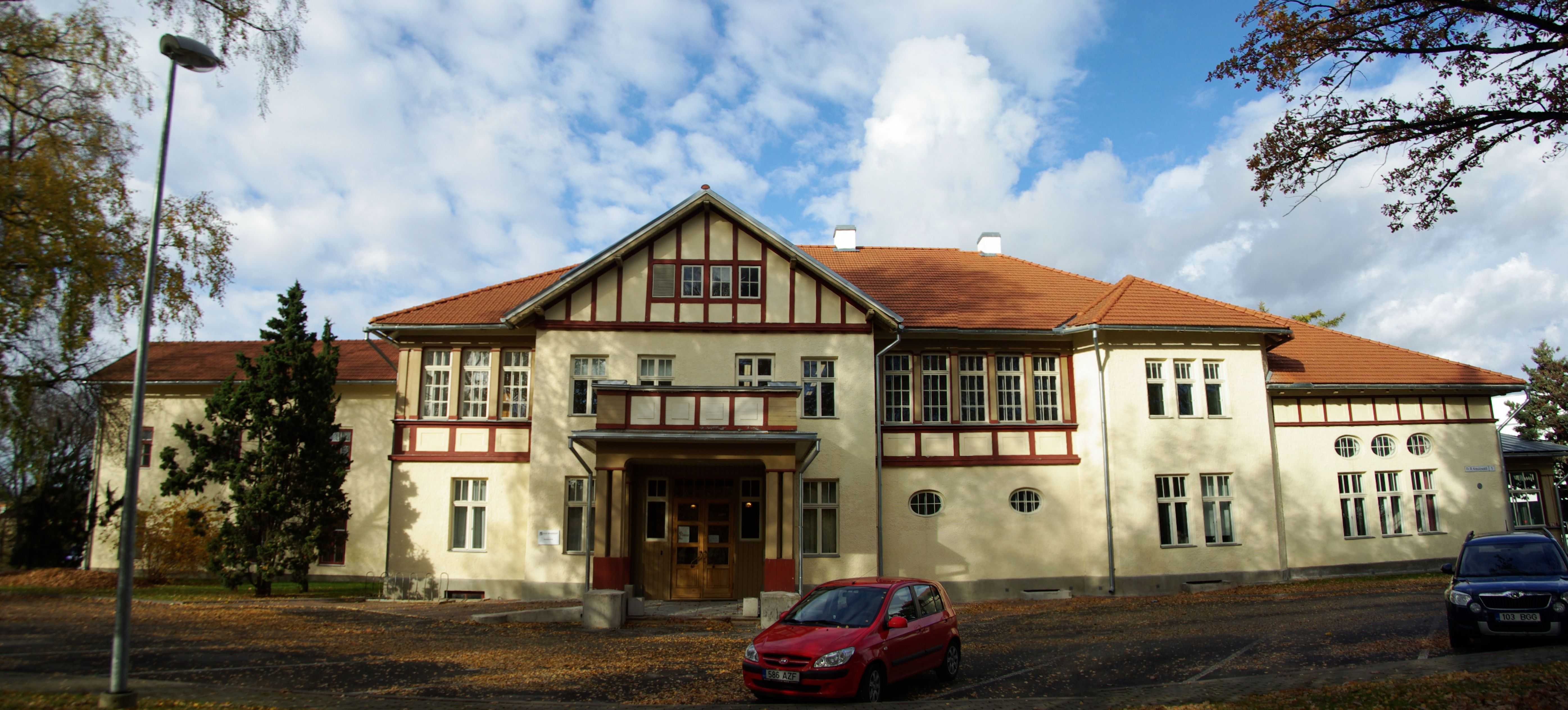 Tartu,F. R. Kreutzwaldi tn 1